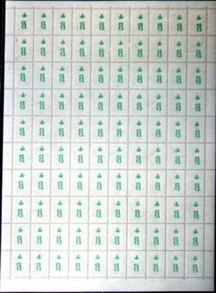 Абкляч надпечатки на марках Республики Беларусь. Лист безноминальных почтовых марок Республики Беларусь (2000, литера «В»).